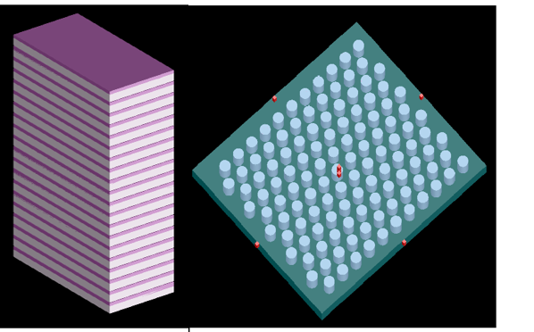 Երկչափ և Միաչափ ֆոտոնային Բյուրեղների օրինակներ